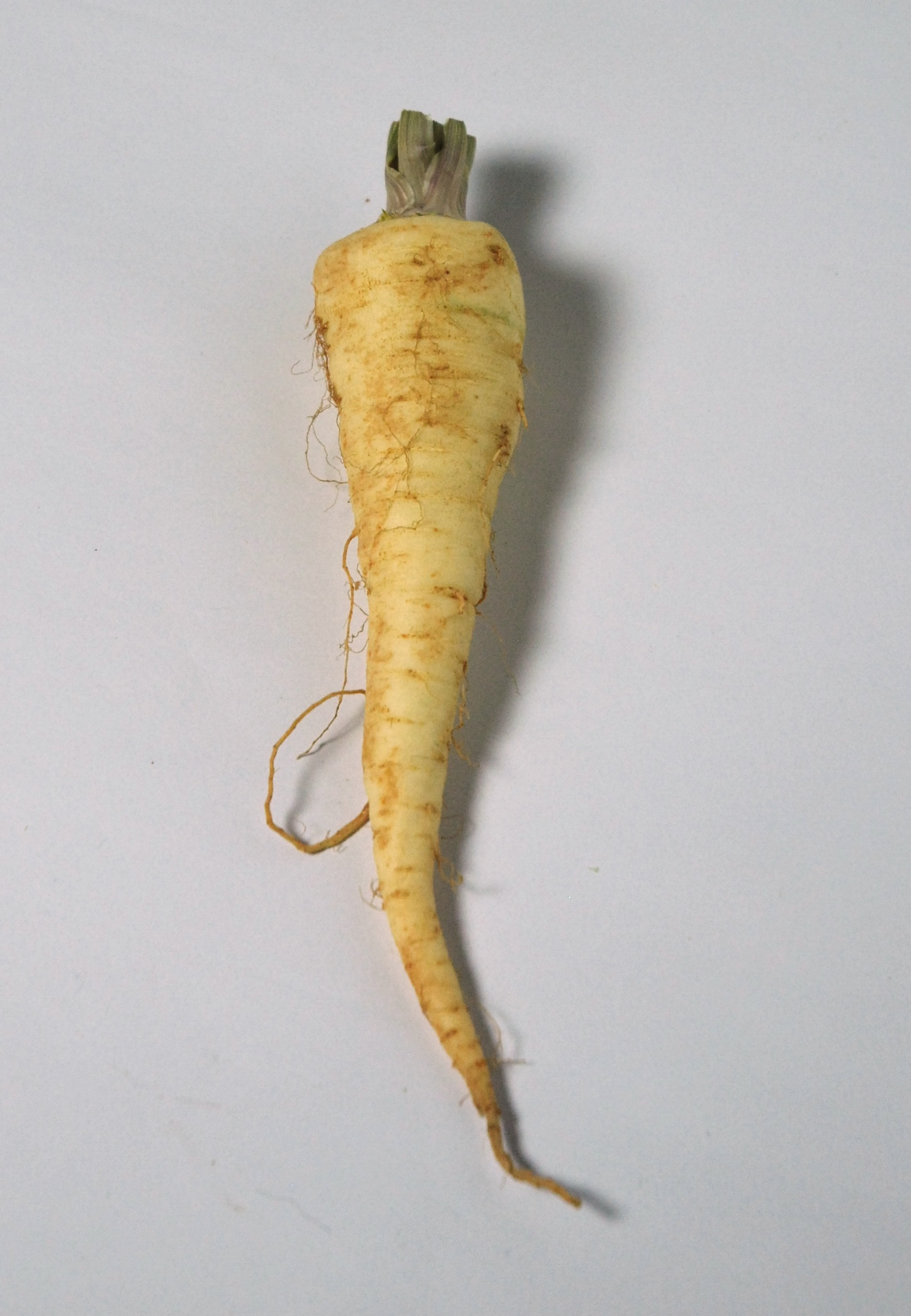 Petržel